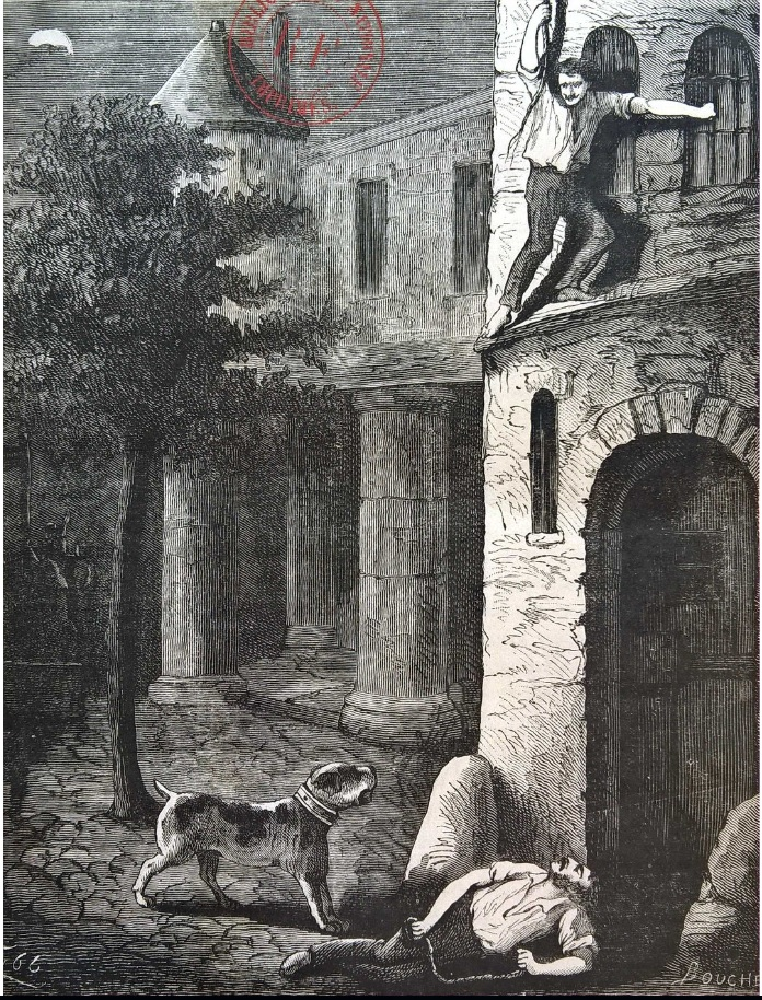 Gravure de frontispice du roman Les Habits noirs de Paul Féval, Paris, Éditions S. Coste, 1876. BnF, département Littérature et art, 4-Y2-56.